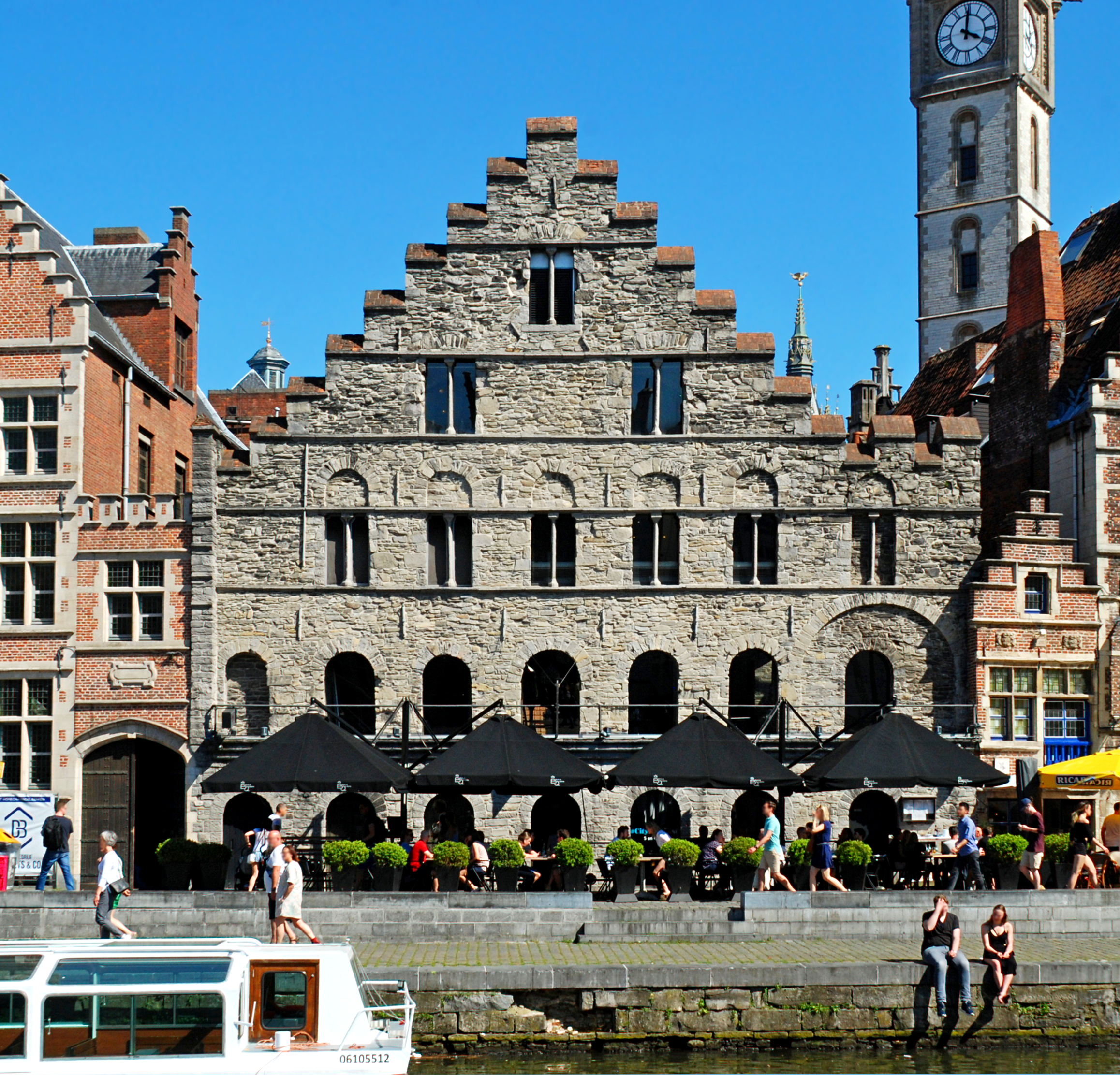 Belgique - Gand - maison romane dite "Spijker"